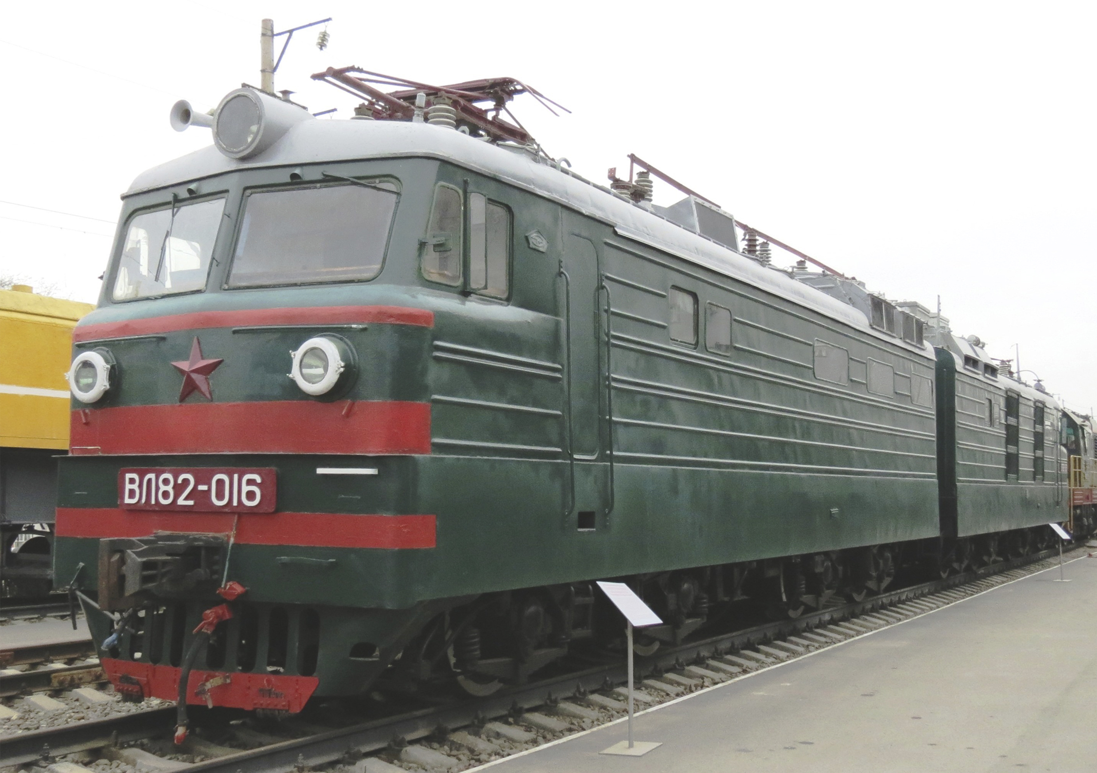 Электровоз ВЛ82-016 в Ростовском музее железнодорожного транспорта. Построен в 1968 году Новочеркасским электровозостроительным заводом